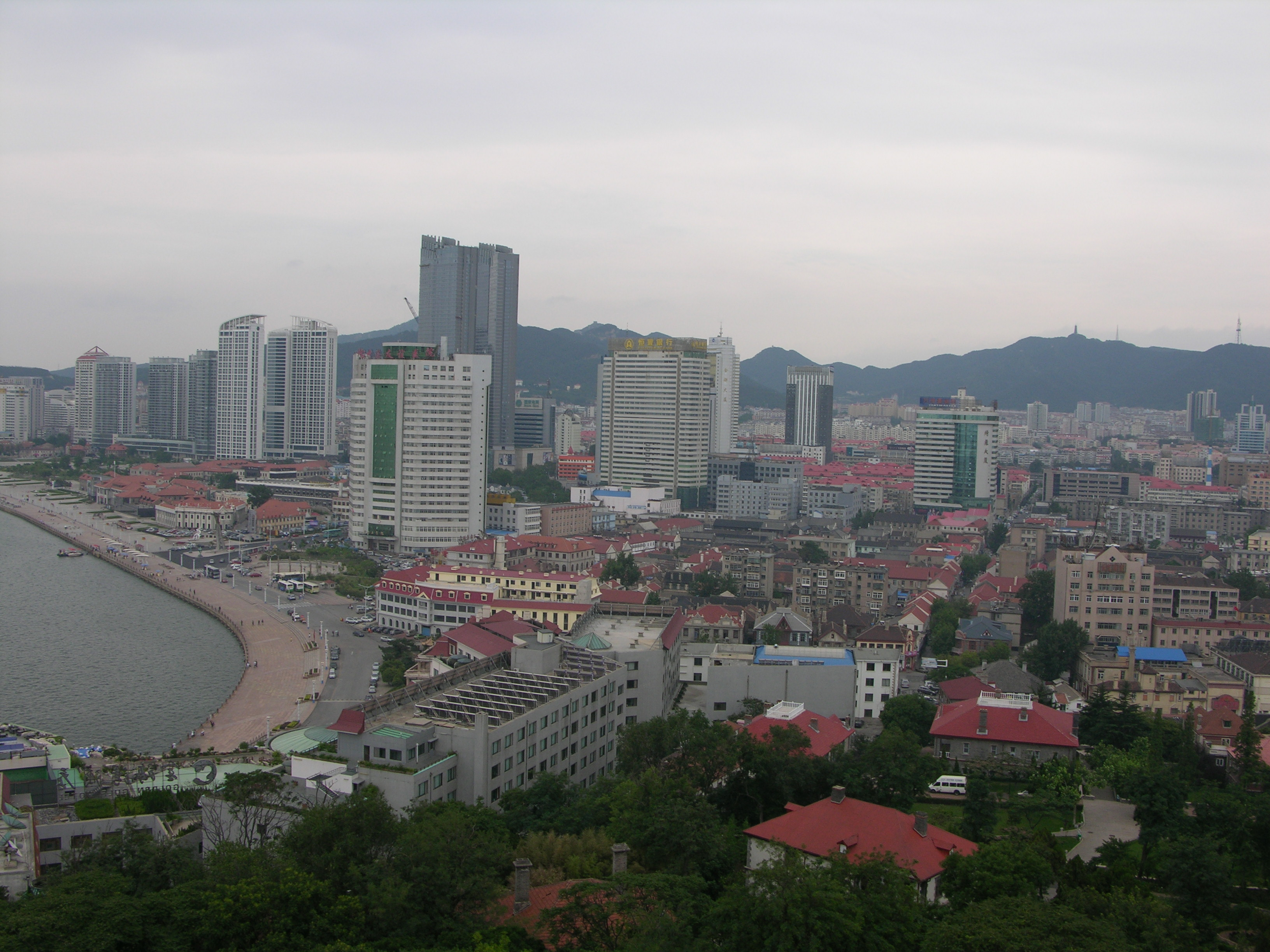 Zhifu, Yantai, Shandong, China